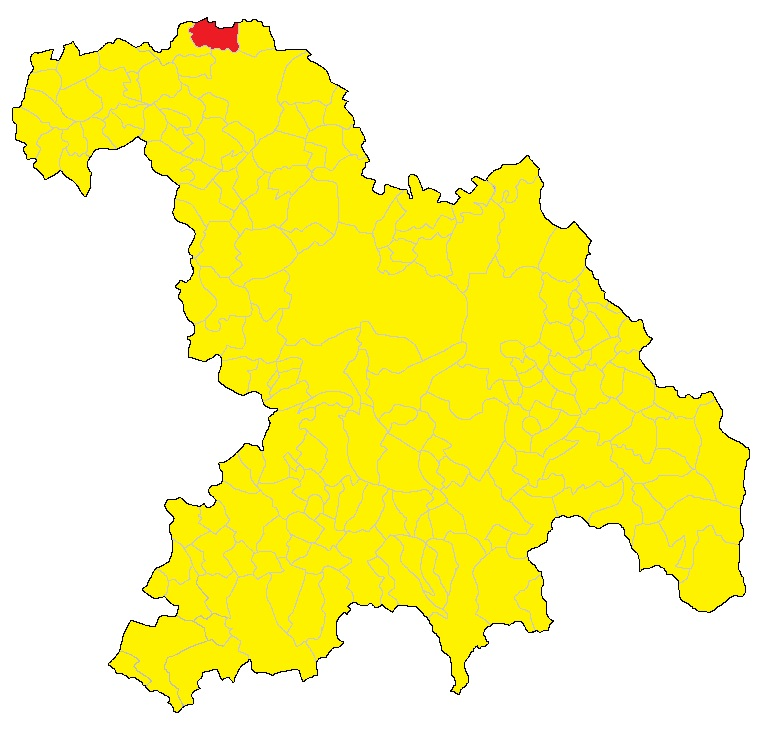 Mappa del comune di Balzola (AL).